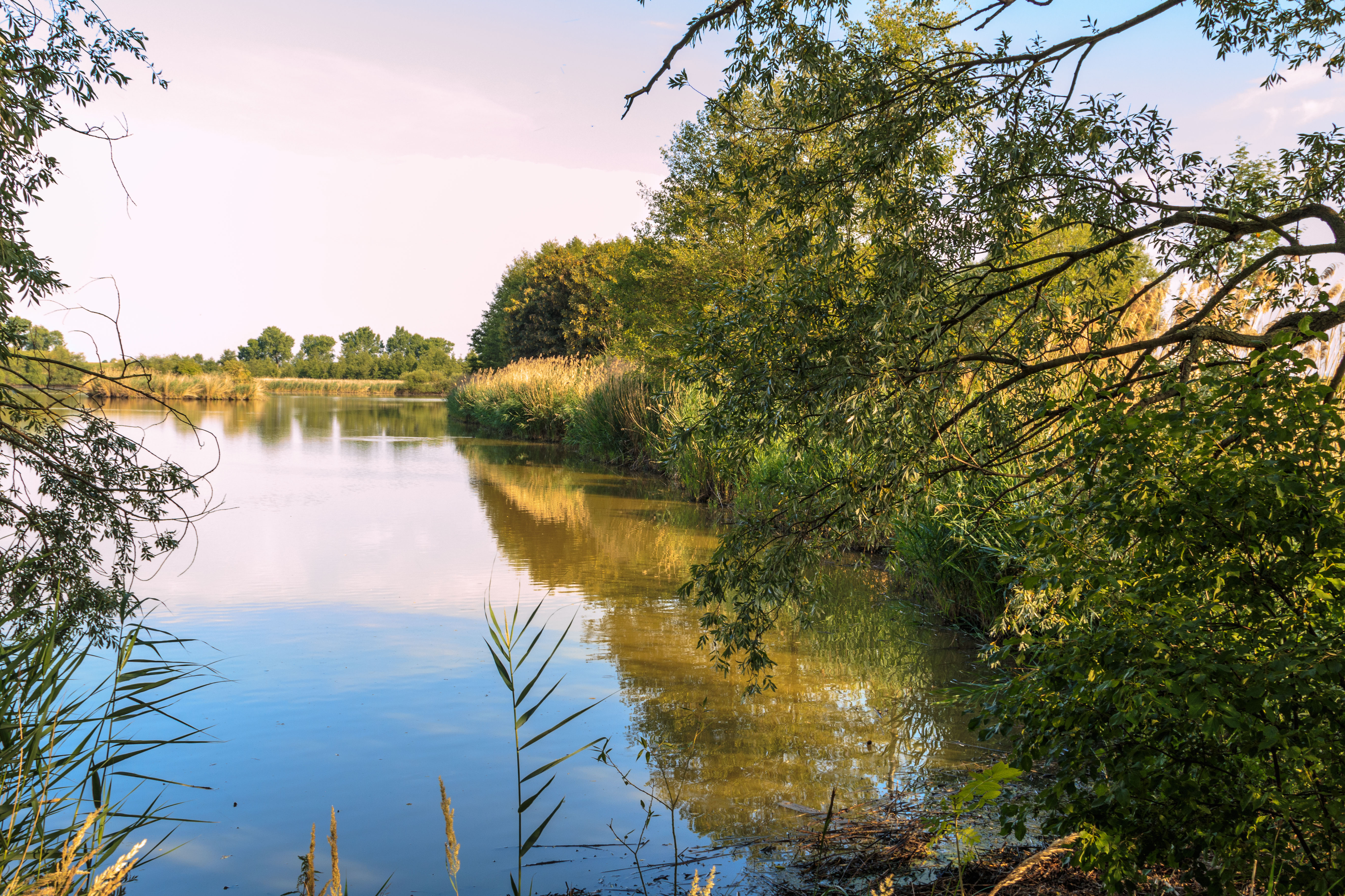 PP Rybník Smrkovák Project: Chráněná území.